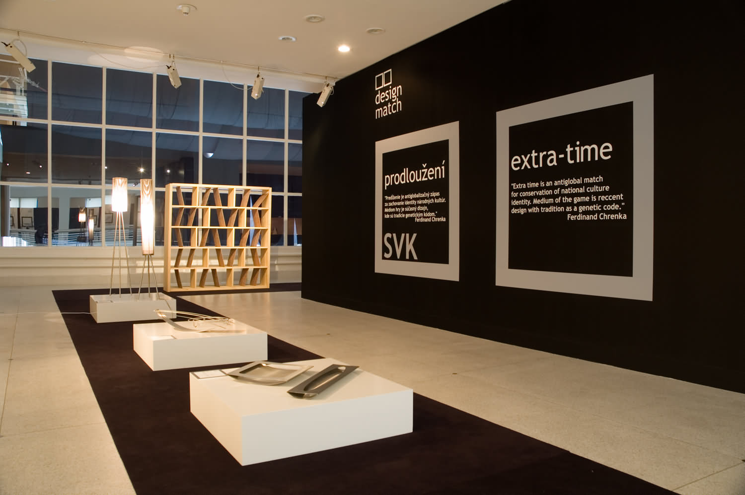 Výstava Design Match, přehlídka designu probíhala v Národní galerii v Praze, 2008